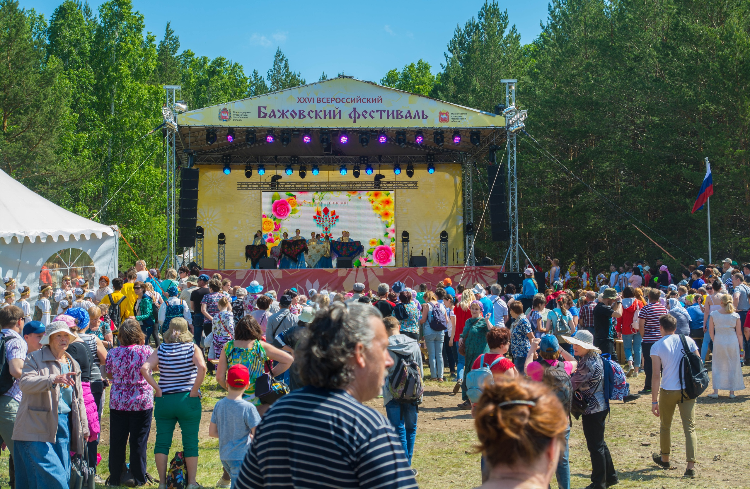 Бажовский фестиваль 2018. главная сцена. село Демарино Пластовкий район